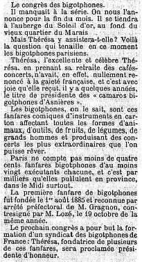 Annonce du congrès des bigophones.